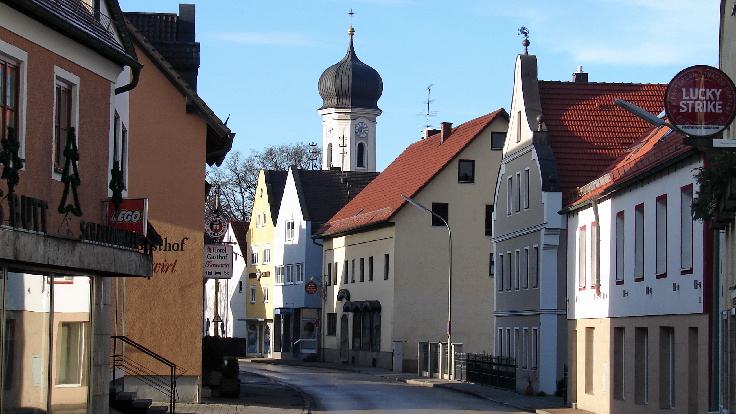 Die Obere Hauptstraße in Au, früher die Bundesstraße 301.